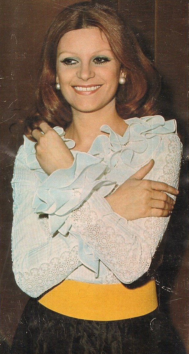 Italian singer Milva, Milan, 1972.